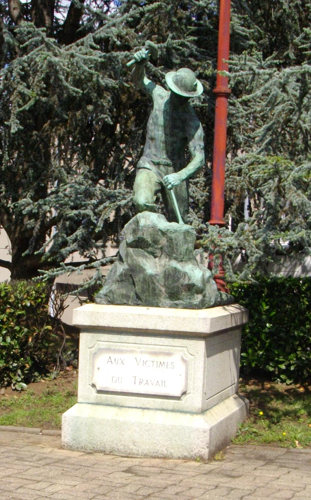 "Mineur de Carmaux" (1925), en hommage aux victimes du travail, ouvrage de Paul Graf, inauguré au Parc du Pré-Grand et aujourd'hui situé sur le Square Gabriel-Bousquet (Avenue Albert Thomas) à Carmaux.